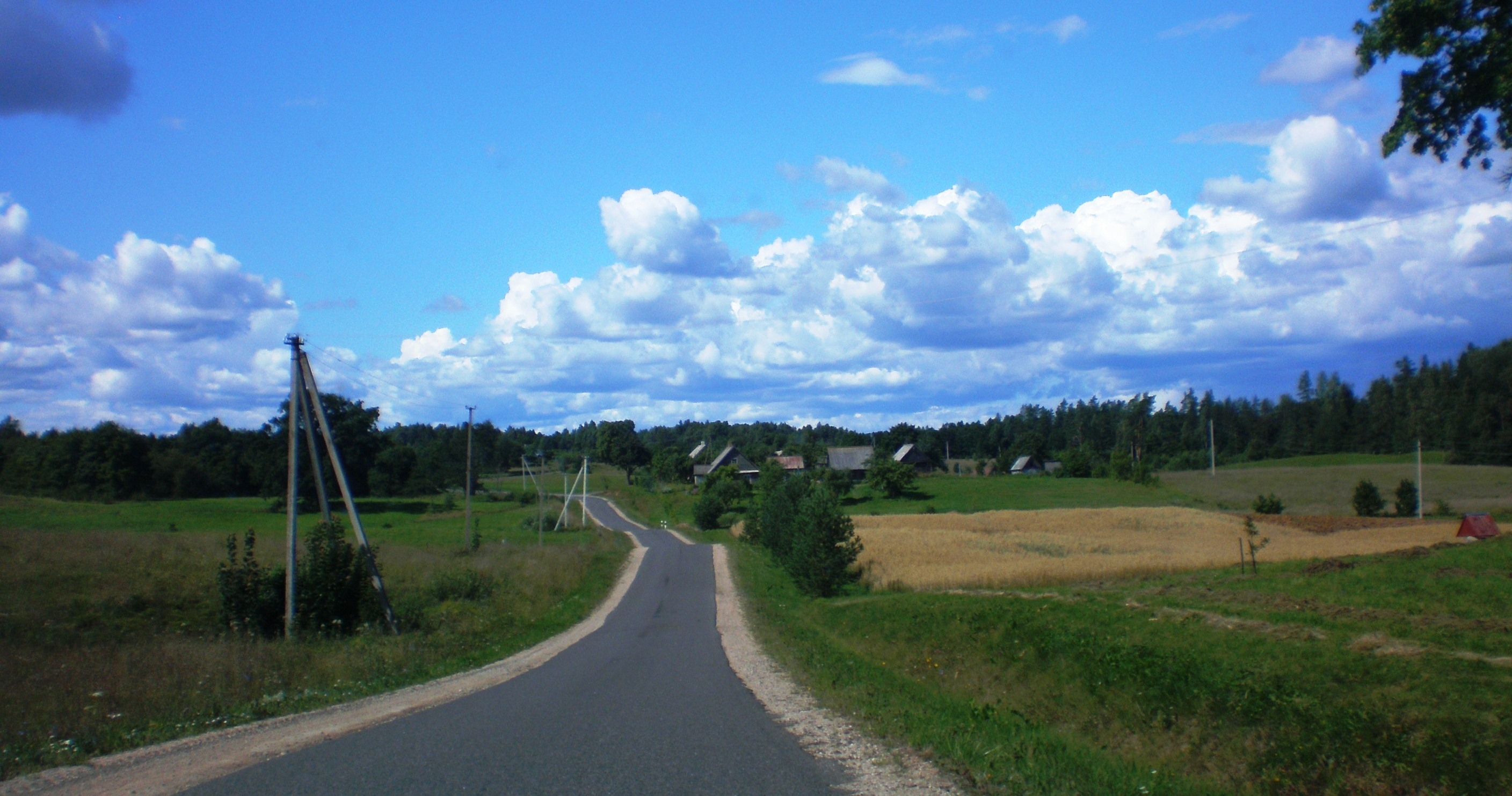 Laužadžiai, Zarasų raj., Lietuva